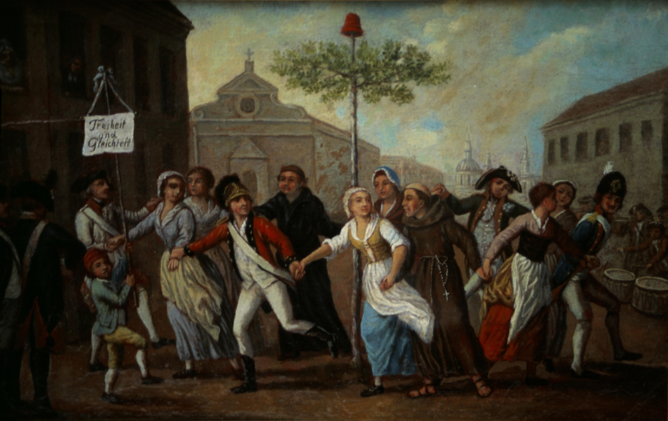 Tanz um den Freiheitsbaum, Gemälde eines unbekannten deutschen Künstlers, um 1792/1795. (Erinnerungsstätte für die Freiheitsbewegungen in der deutschen Geschichte des Bundesarchivs)